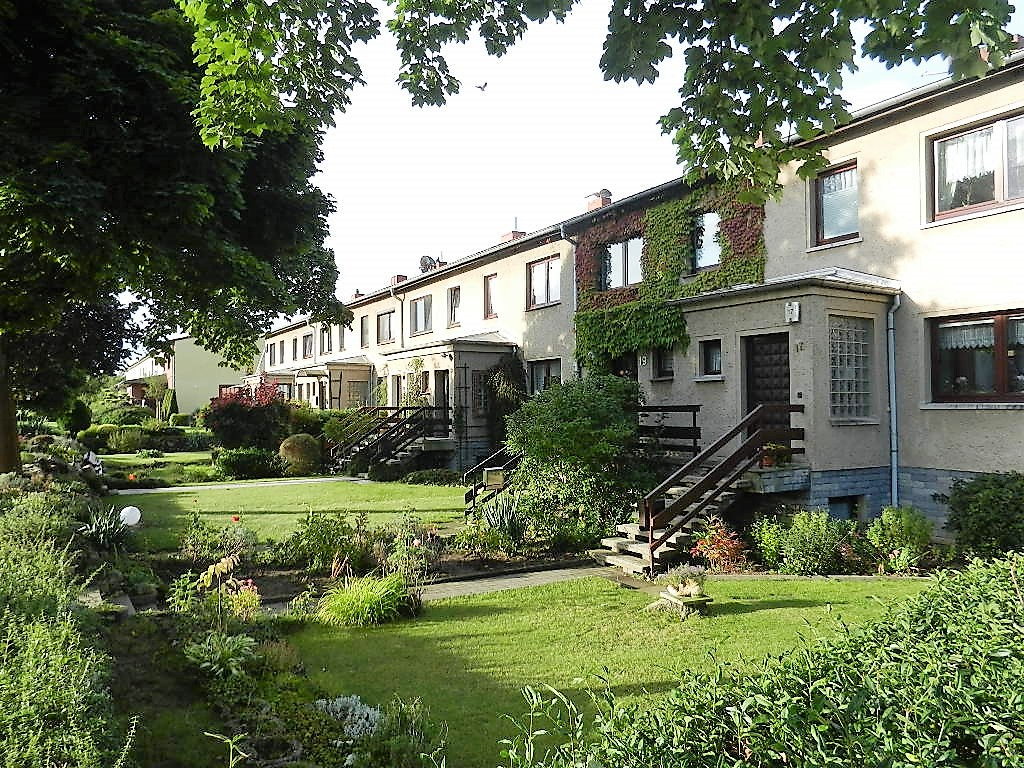 Musterreihenhaus R4, Ahornstraße Schwerin Lankow